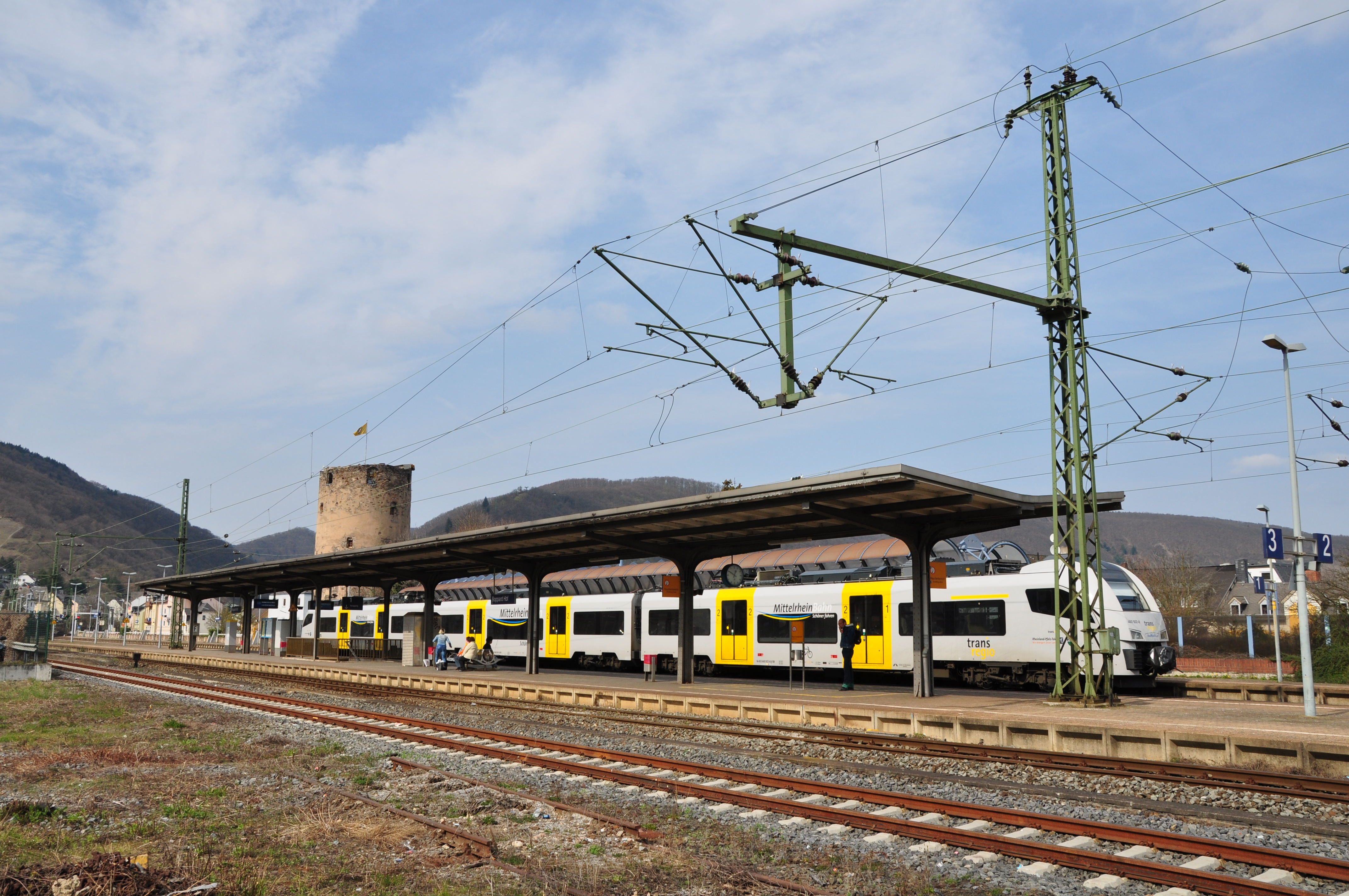 Der Hauptbahnhof von Boppard mit einem Siemens Desiro